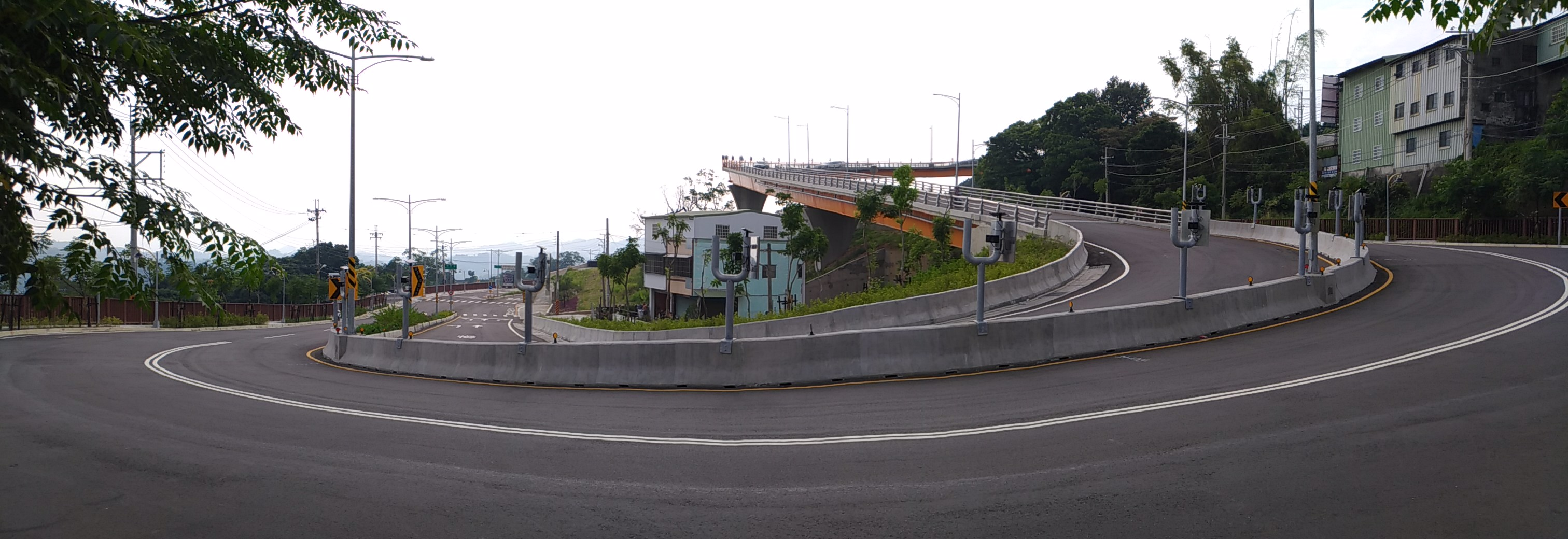 中文（台灣）: 東山路新社進入北屯路段